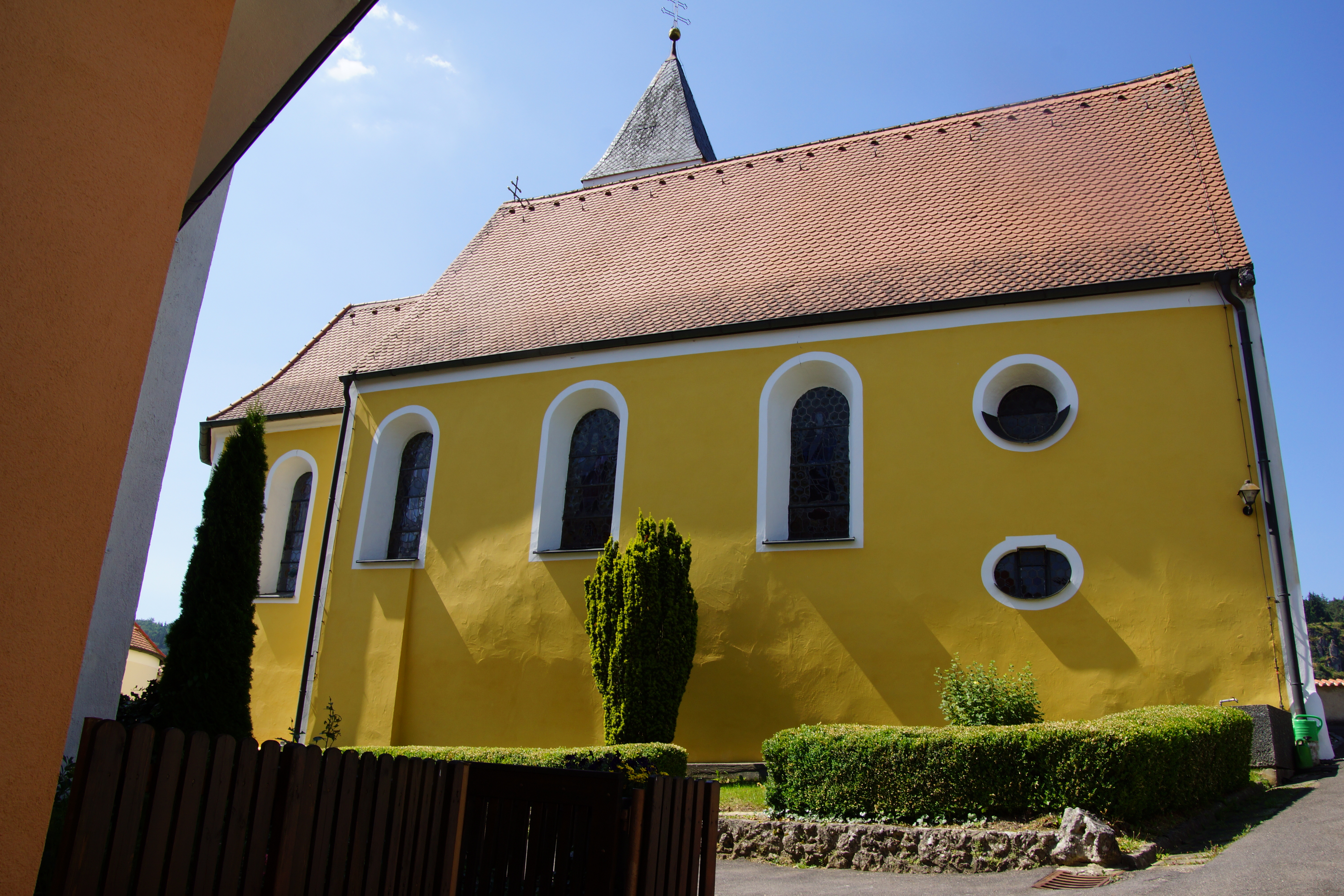 Die katholische Pfarrkirche St. Michael in Allersburg, Markt Hohenburg in der Oberpfalz